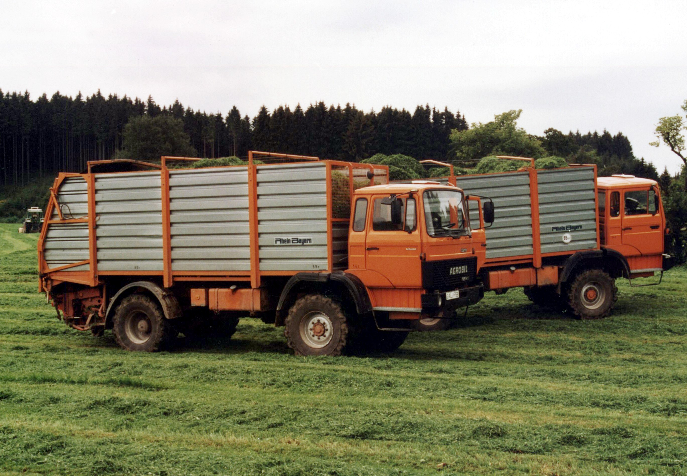 RheinBayern Agrobil 1992